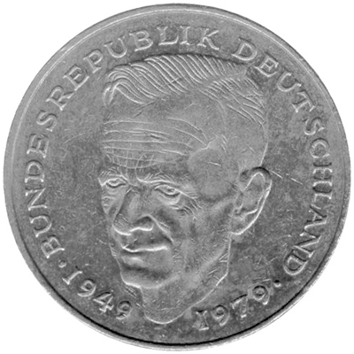 Kurt_Schumacher op een 2DM-muntstuk